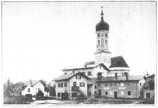 Der ehemalige Dorfplatz in Zorneding mit der Kirche St. Martin im Hintergrund vor 1900.